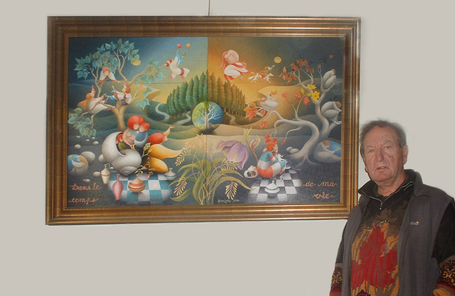 portrait